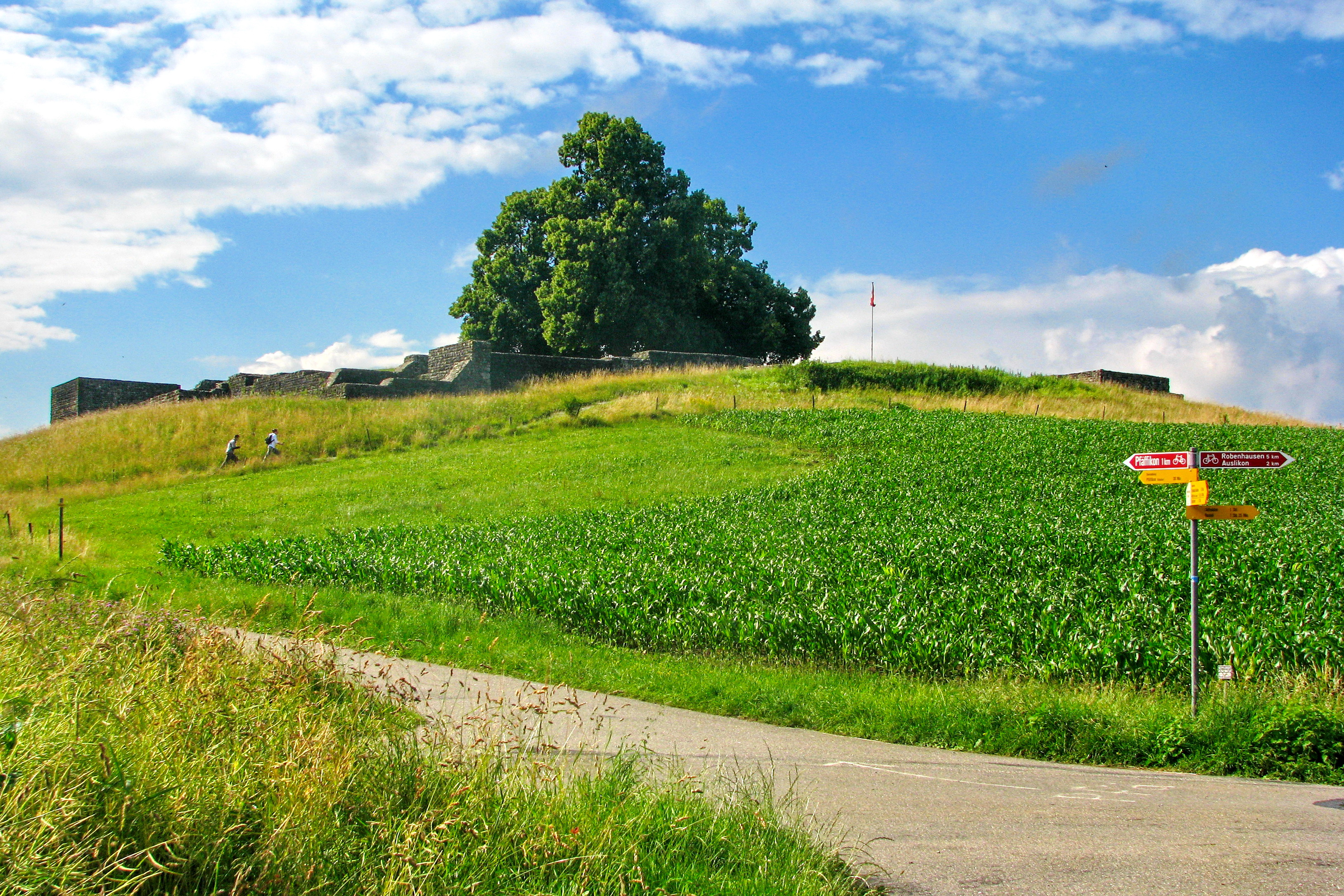 Römisches Kastell in Irgenhausen (Pfäffikon, Switzerland)